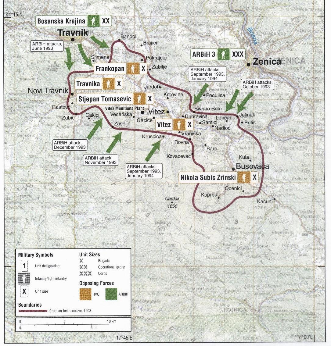 Crte bojišnice između HVO-a i ARBiH, lipanj 1993. - siječanj 1994.